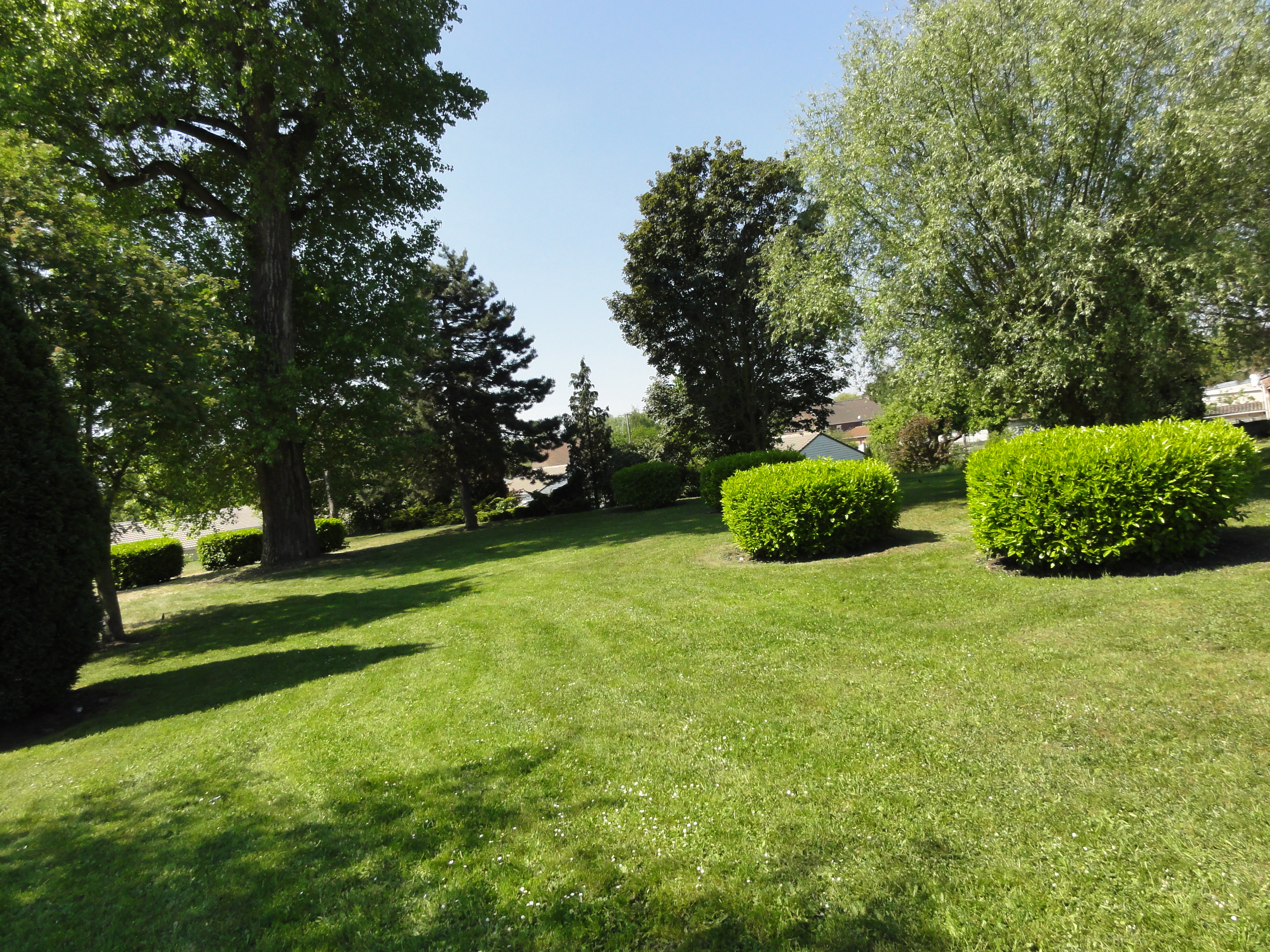 Terril n° 193 dit Trou Martin, Fosse Trou Martin de la Compagnie des mines d'Anzin, Vieux-Condé, Nord, Nord-Pas-de-Calais, France.